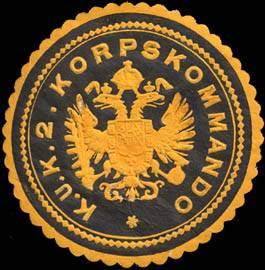 Sealing stamp Title: K. und K. 2. Korpskommando Description: gelb, schwarz, geprägt Place: size: 4 cm